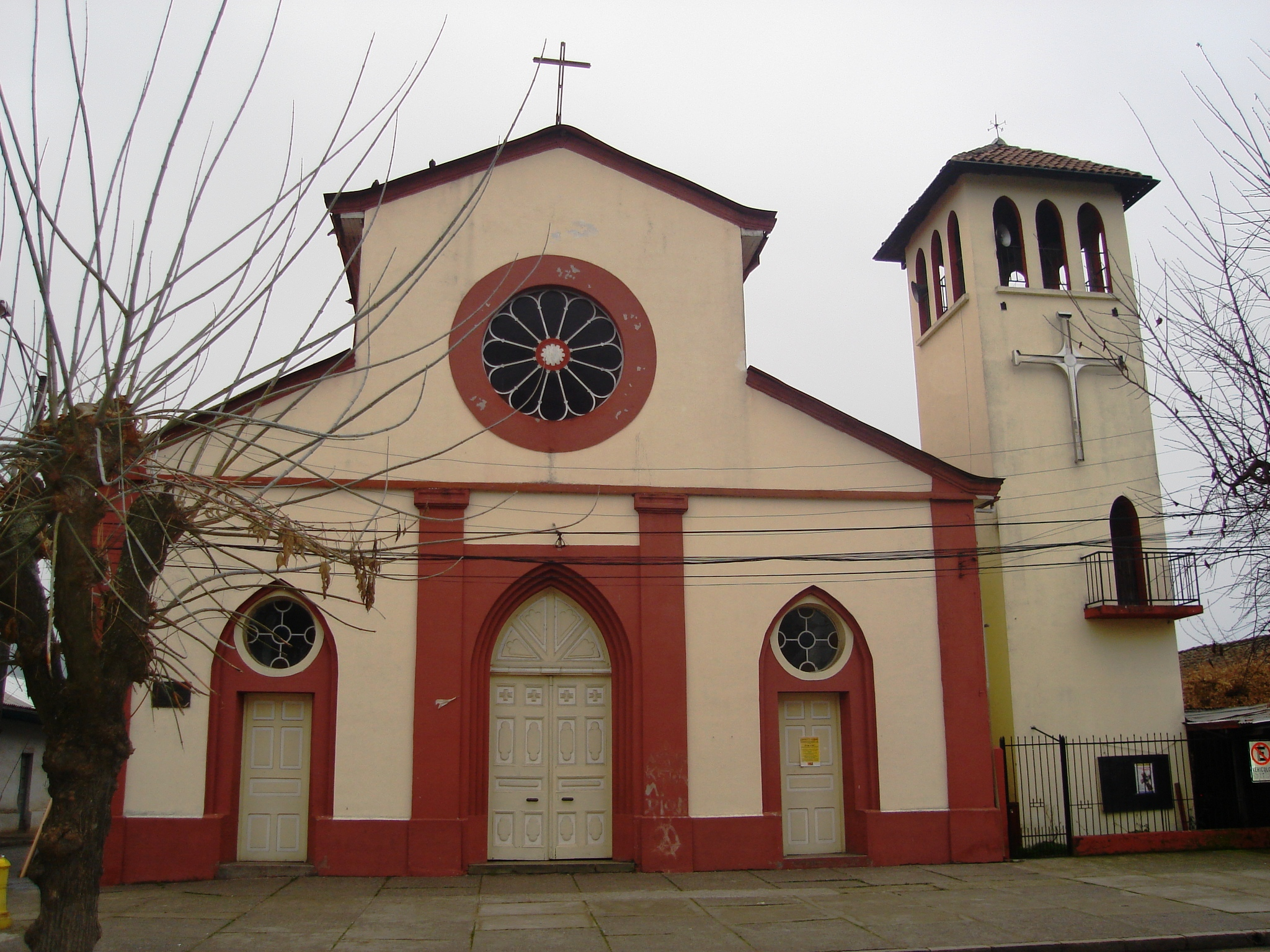 Vista frontal de la Iglesia de La Merced en Doñihue